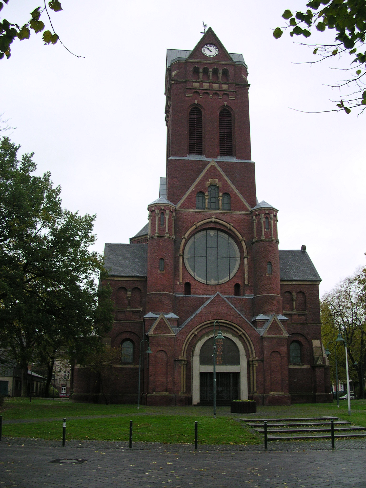 Joachimskirche in Düren